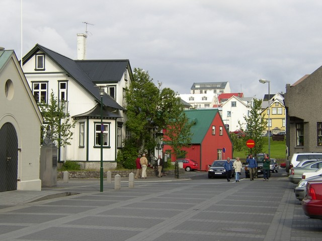 Reykjavík downtown (Reykjavík belváros)